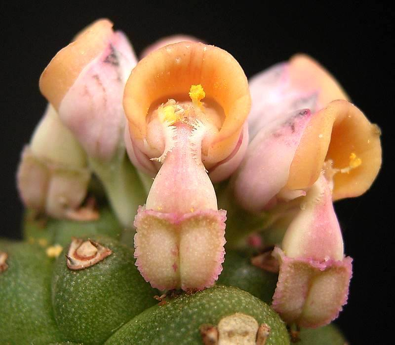 Euphorbia ritchiei ssp. marsabitensis